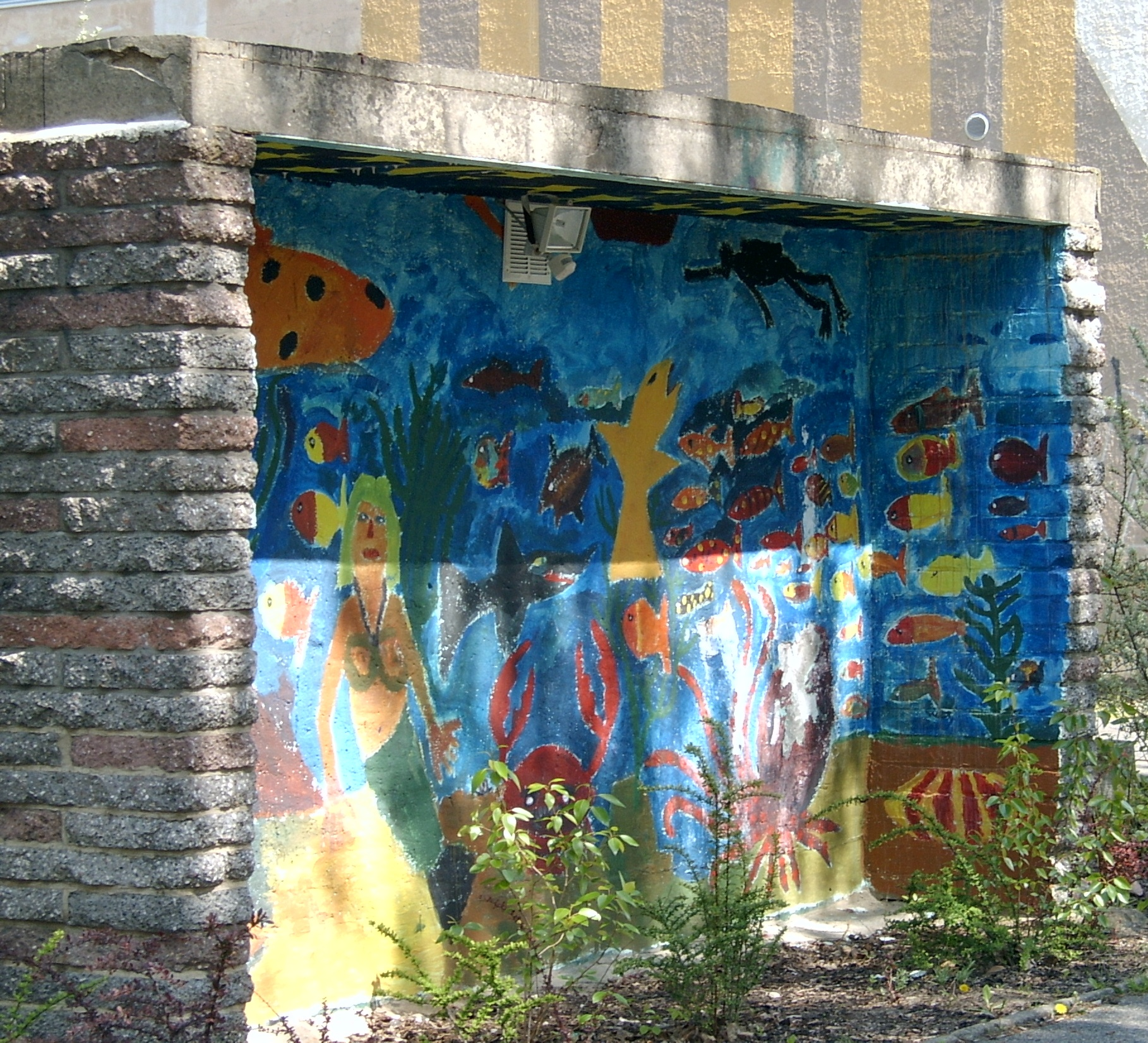 Freie Waldorfschule Frankfurt (Oder)